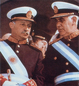 Es una foto del presidente de facto Juan Calros Ongania (izquierda) junto al futuro presidente Lanusse (derecha) en 1966.